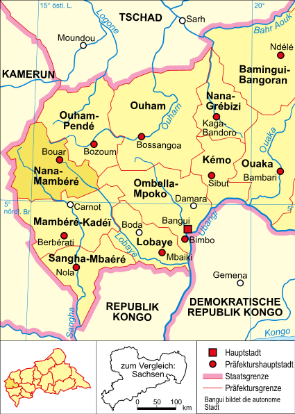 politische Karte der Zentralafrikanischen Republik (Präfektur Nana-Mambéré hervorgehoben)